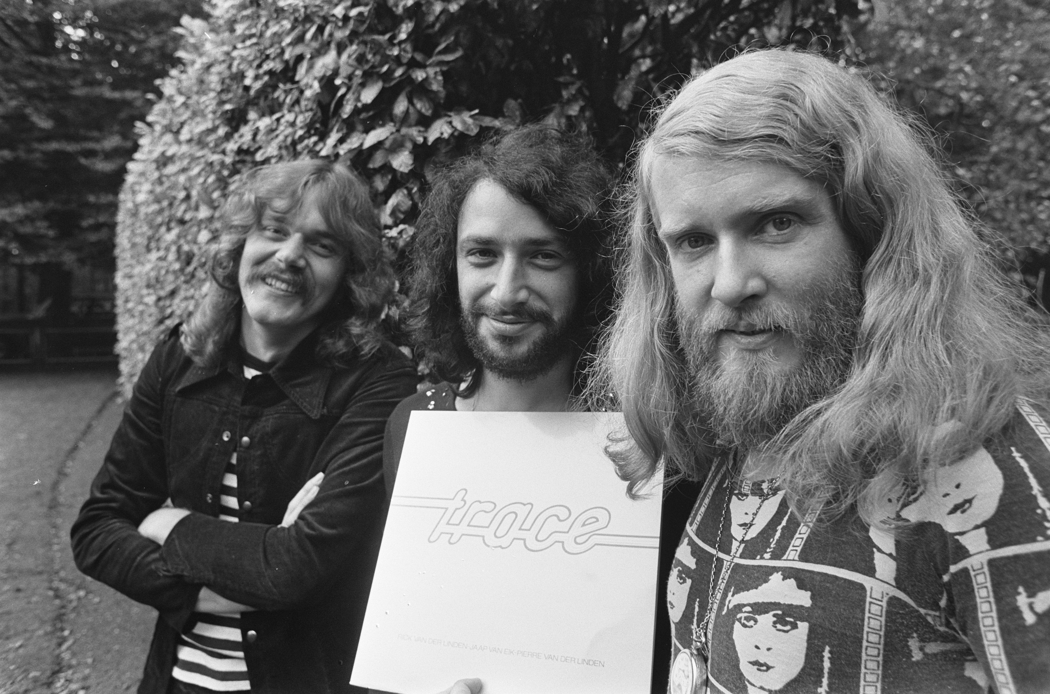 LP van nieuwe formatie TRACE in Den Dolder; van links naar rechts: Jaap van Eik, Pierre van der Linden en Rick van der Linden met LP. Den Dolder (Utrecht), 9 sept. 1974